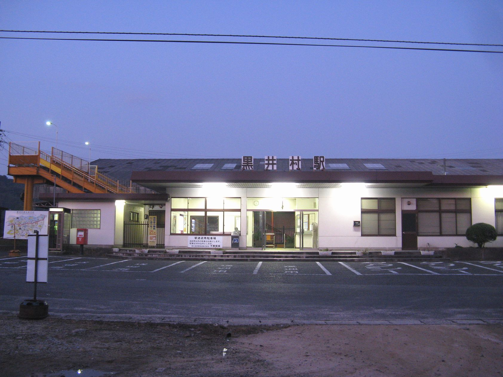 山陰本線黒井村駅 駅舎 2009年10月16日 Bakkai撮影 Category:西日本旅客鉄道の鉄道駅画像 Category:下関市の画像